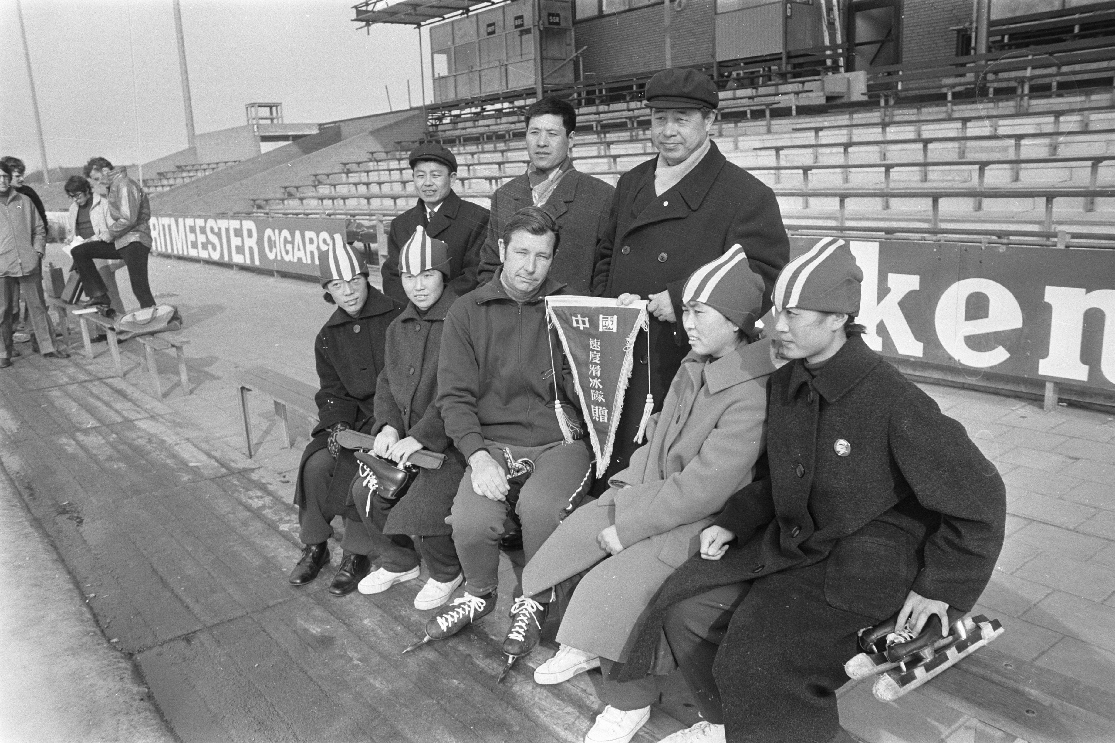 Collectie / Archief : Fotocollectie Anefo Reportage / Serie : Training wereldkampioenschappen schaatsen dames in Heerenveen Beschrijving : Amerikaanse schaatscoach John Werket poseert met Chinese schaatsploeg Annotatie : Werket was de coach van het Amerikaanse team Datum : 3 maart 1972 Locatie : Heerenveen Trefwoorden : schaatsen, sport, trainers Persoonsnaam : Werket, John R. Fotograaf : Punt / Anefo Auteursrechthebbende : Nationaal Archief Materiaalsoort : Negatief (zwart/wit) Nummer archiefinventaris : bekijk toegang 2.24.01.05 Bestanddeelnummer : 925-4290